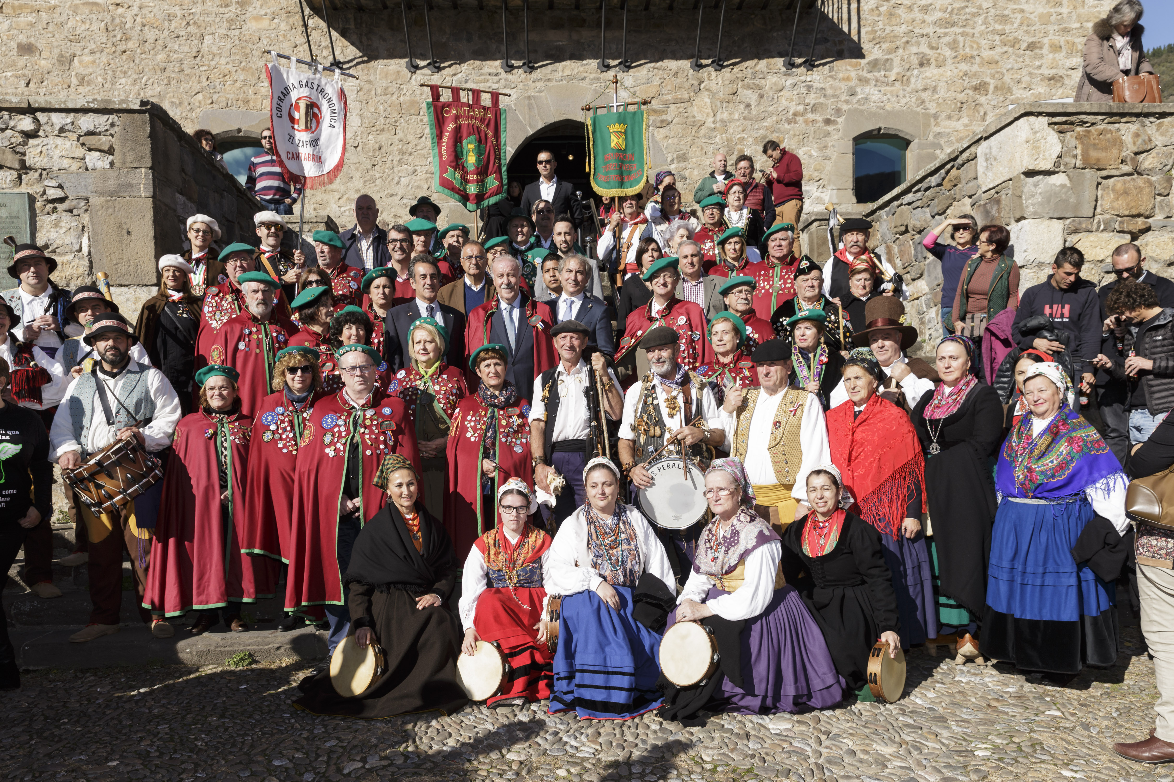 Recepción del Orujero Mayor Vicente del Bosque. 11 de noviembre de 2017 © Raúl Lucio